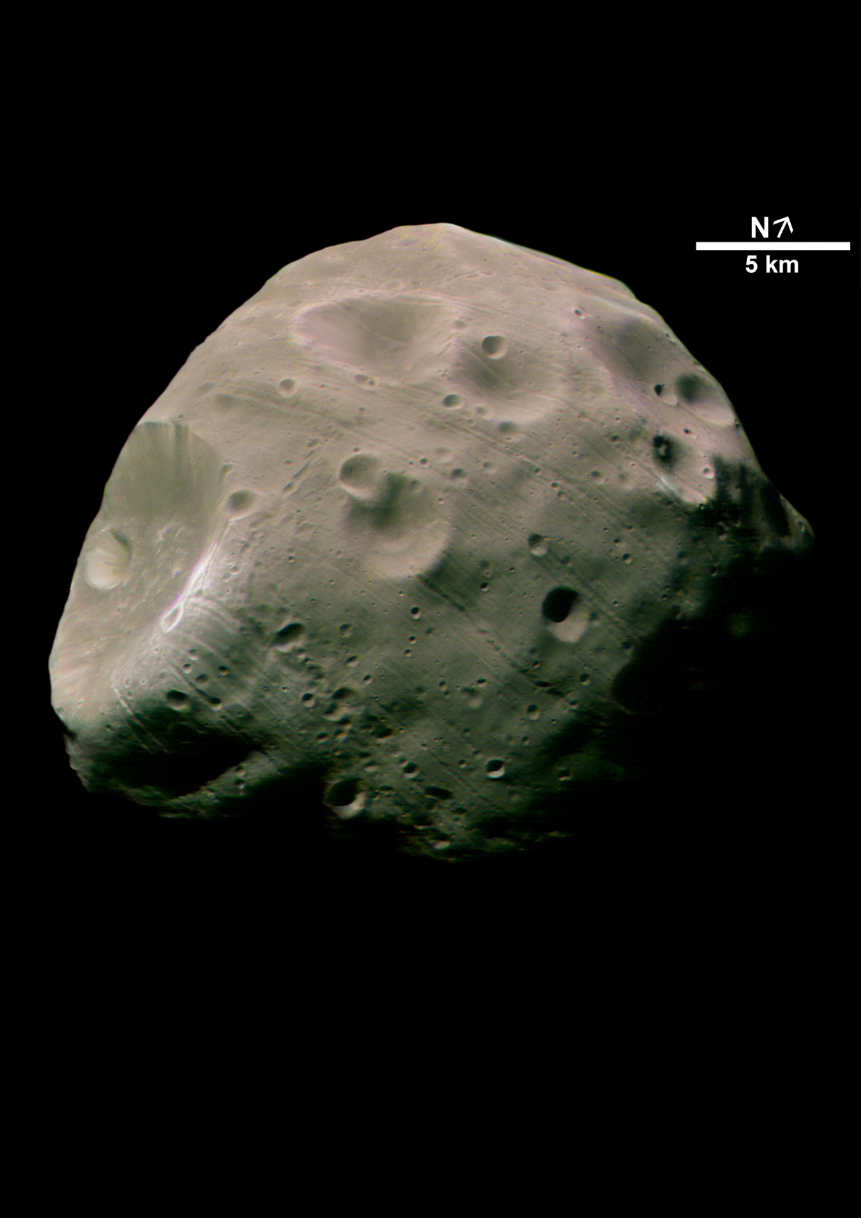 Fobos (NASA) - 08